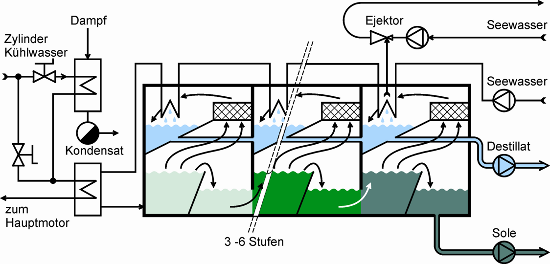 Entspannungsverdampfer